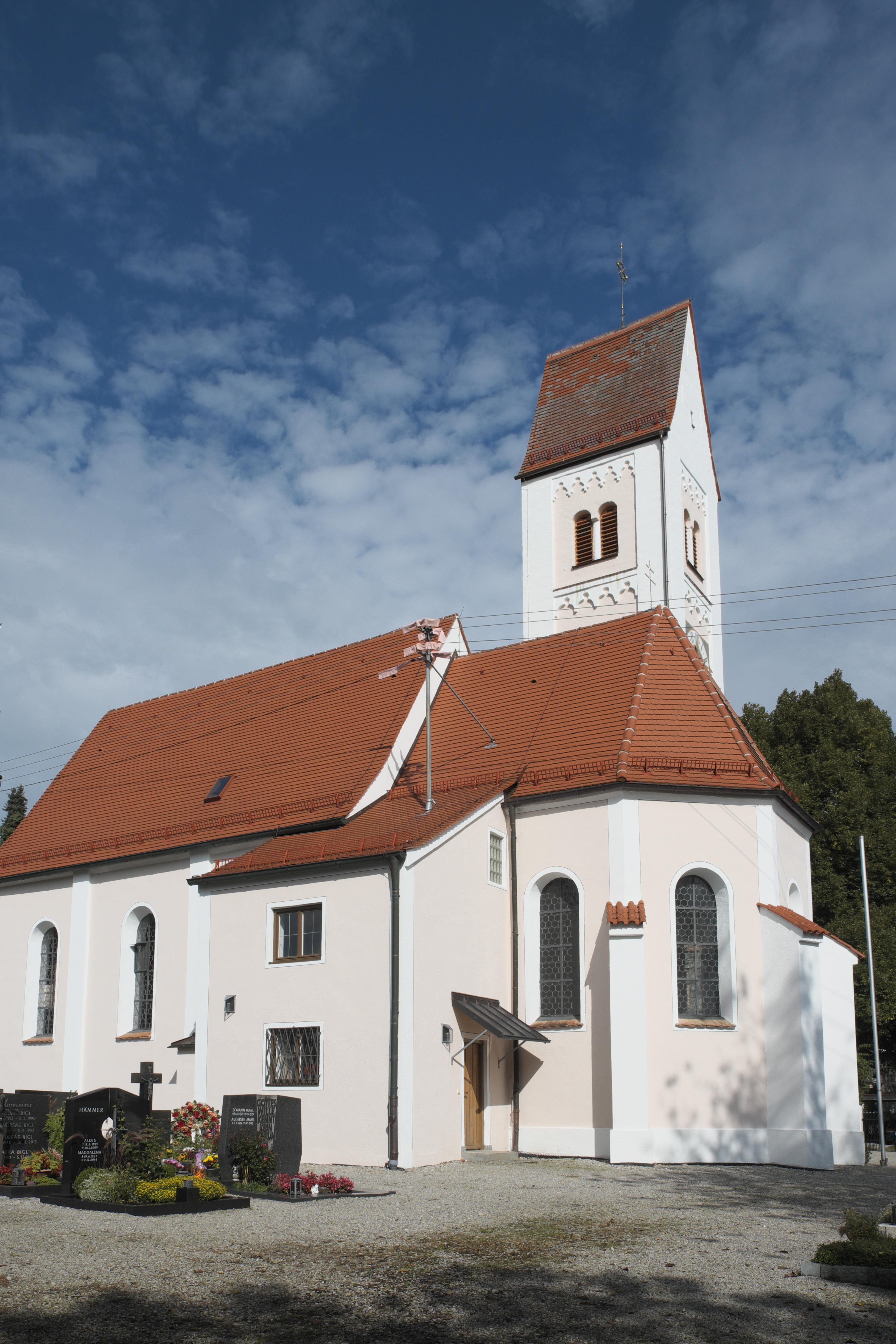 Katholische Pfarrkirche St. Rupert in Oberdießen (Unterdießen) im Landkreis Landsberg am Lech (Bayern/Deutschland)